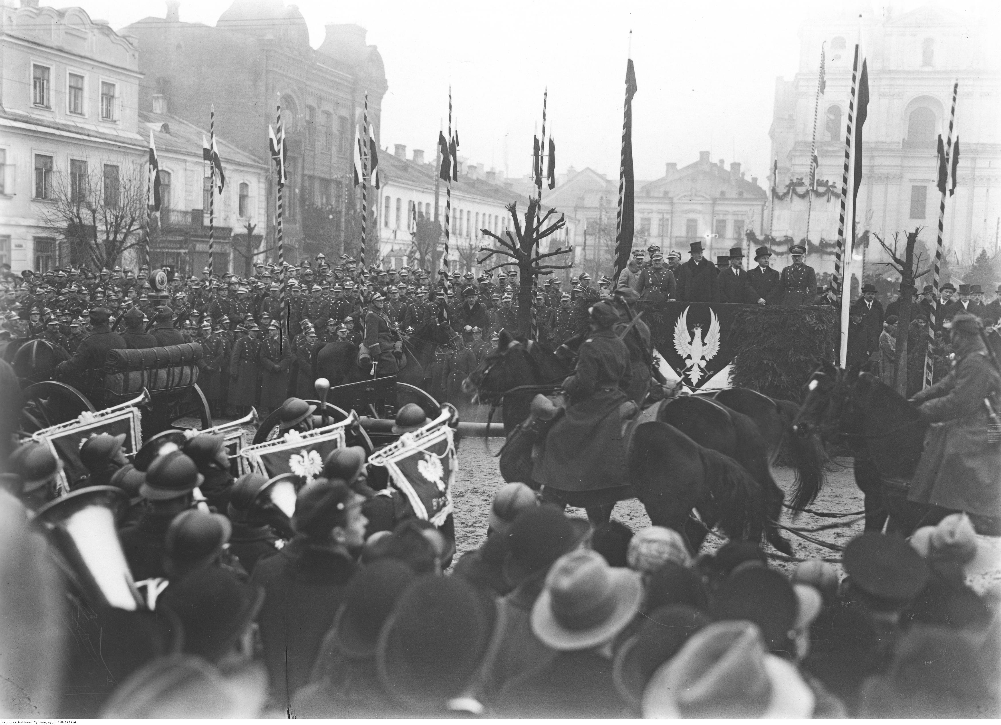 Obchody 400 rocznicy urodzin króla Stefana Batorego w Grodnie; listopad 1933. Fragment defilady 29 Pułku Artylerii Lekkiej w Grodnie. Widoczni m.in: prezydent RP Ignacy Mościcki (odbiera defiladę), szef Gabinetu Wojskowego Prezydenta RP pułkownik Jan Głogowski. Koncern Ilustrowany Kurier Codzienny - Archiwum Ilustracji. Sygnatura: 1-P-3424-4